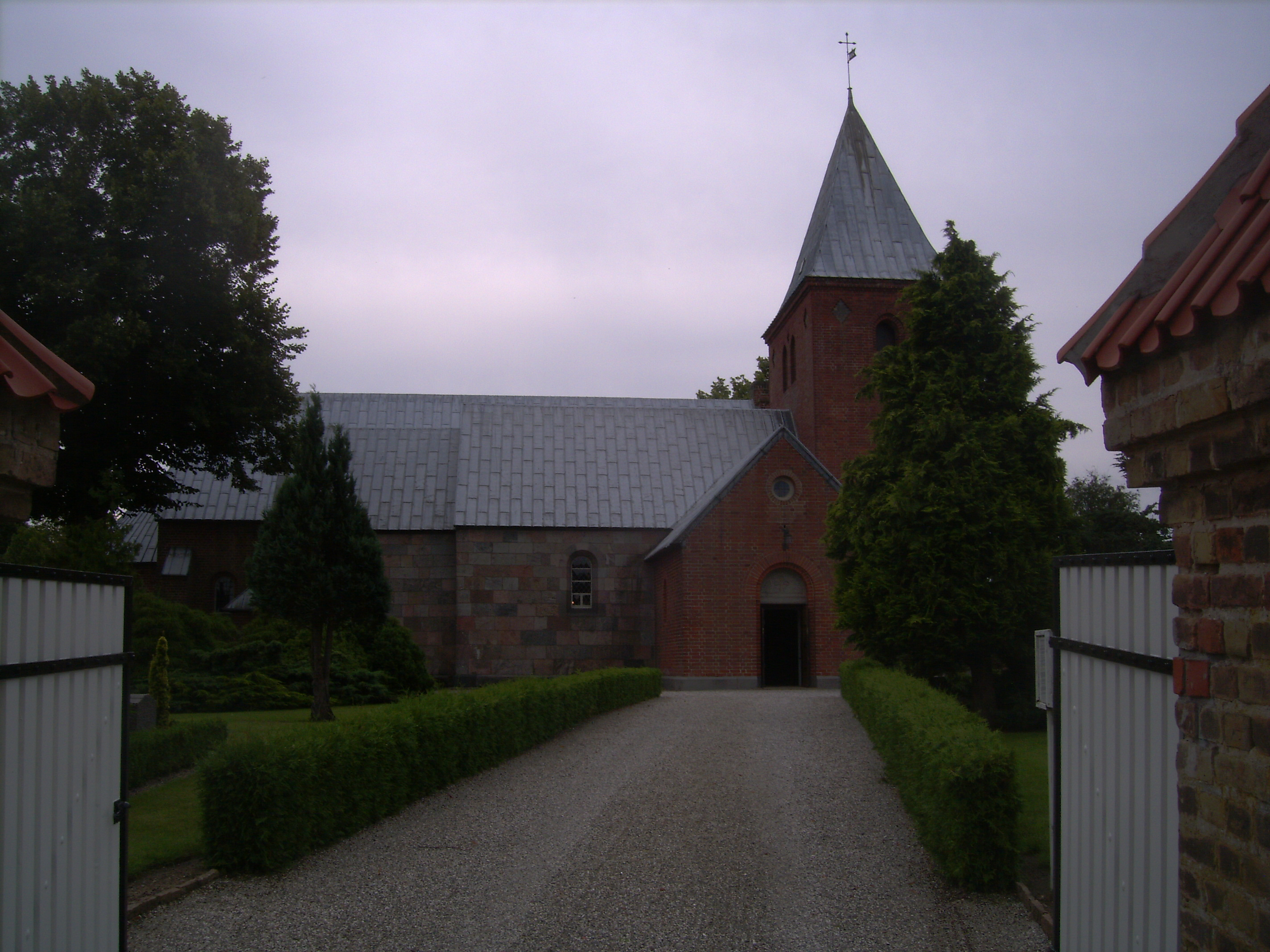 Vejlby Kirke,Rougsø Kommune. Side entrance